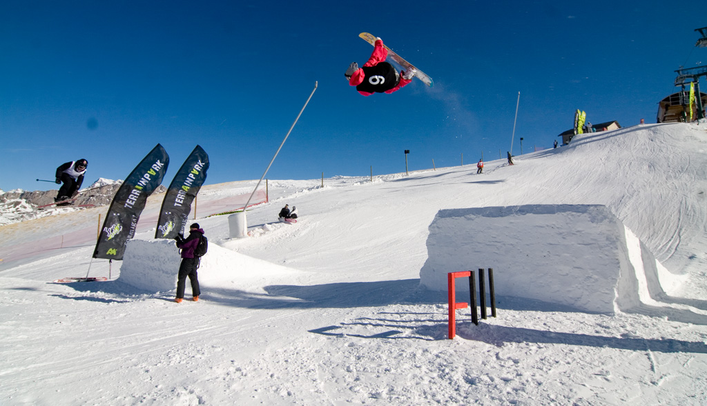 Txoripapa 2008 Formigal